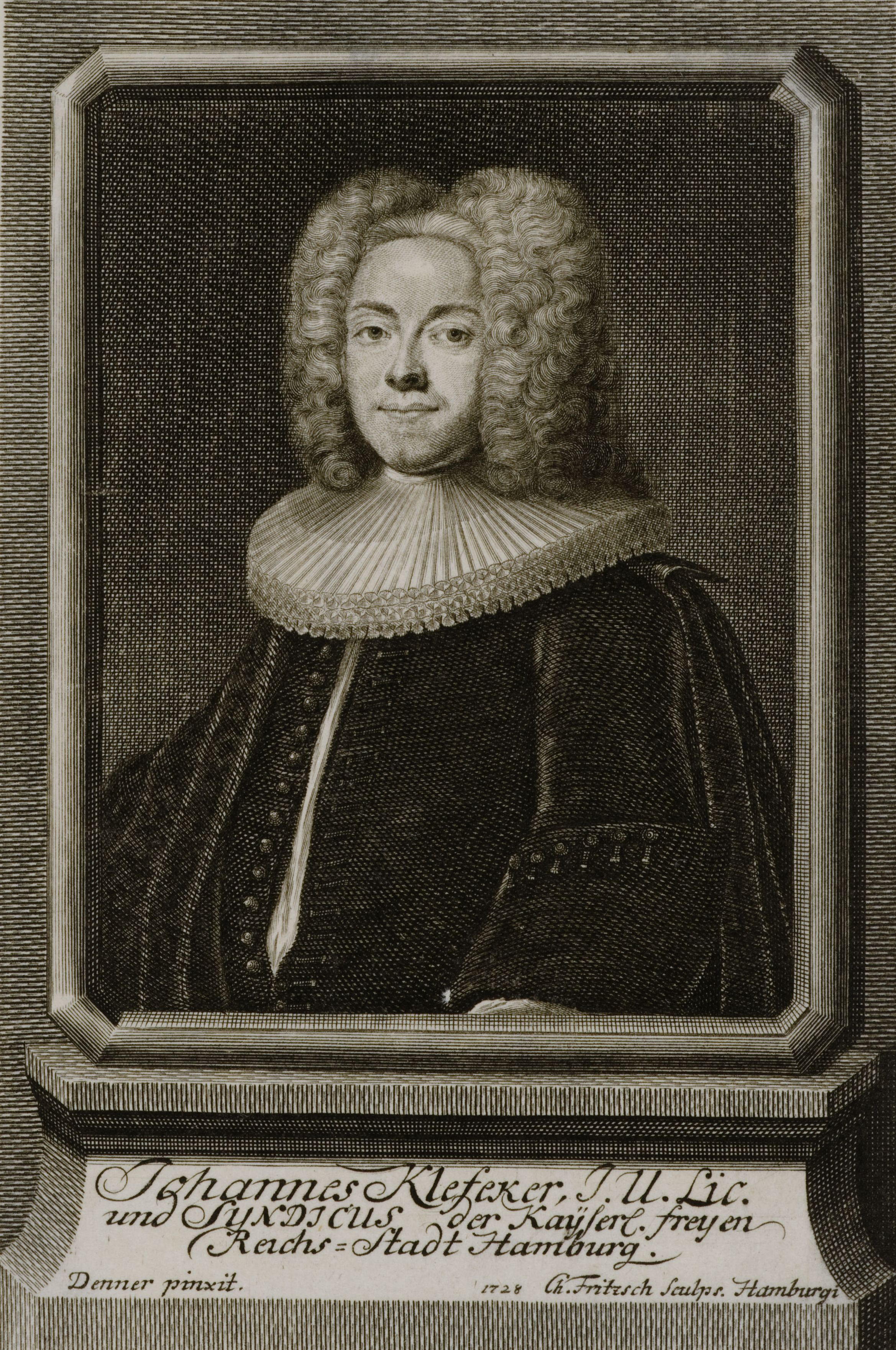 Johannes Klefeker J. U. Lic. und Syndicus der kayserl. freyen Reichs Stadt Hamburg